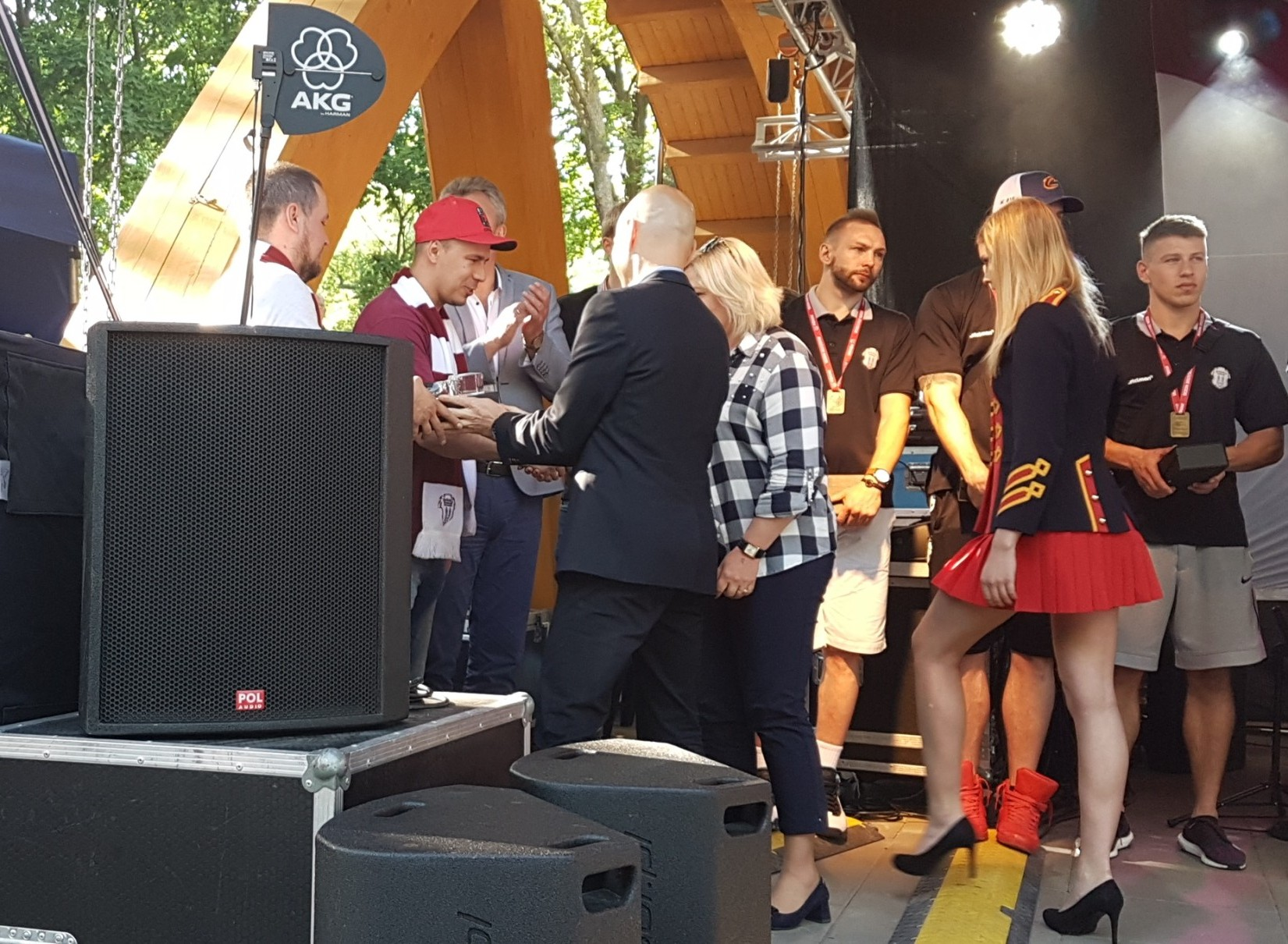 Wyróżnienie dla klubu kibica (19.05.2018)